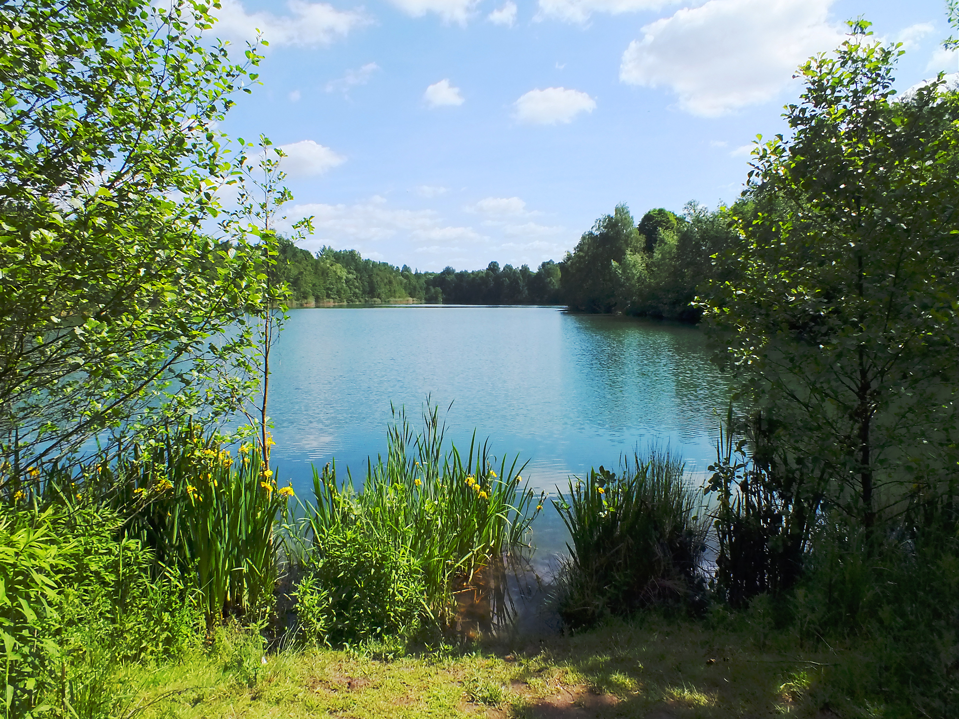 Ansicht des Heidhofsees zu Bottrop-Kirchhellen in der Kirchheller Heide